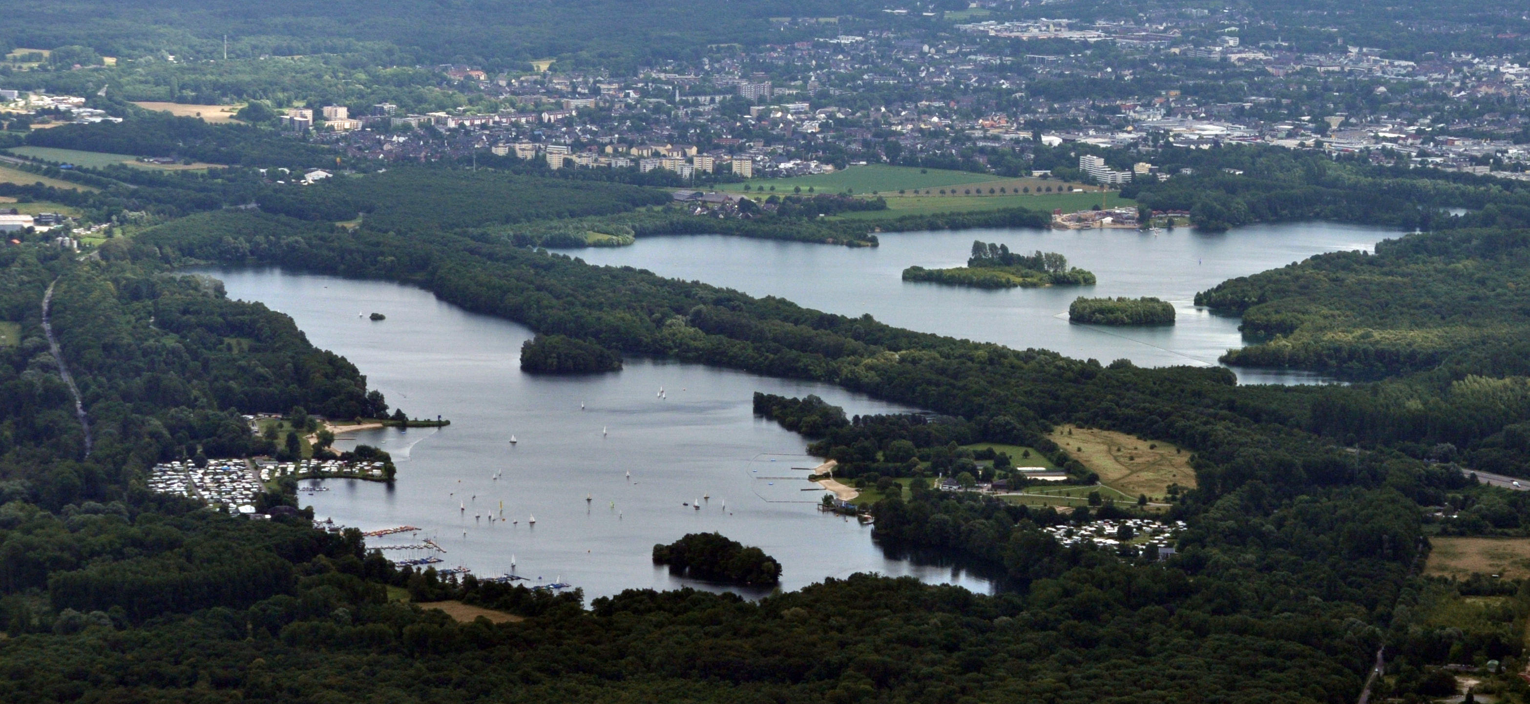 Luftbild des Unterbacher Sees (vorn links) und des Elbsees (hinten rechts)